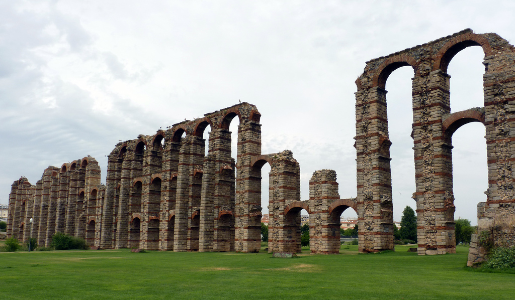 Impresionante visión del acueducto. Arcos del acueducto romano de Los Milagros del S. I d.C. (popularmente conocido así porque es un milagro que después de casi dos mil años todavía se tenga en pié). Traía el agua a la ciudad desde el embalse de Proserpina (a unos cinco kilómetros de Emérita Augusta), salvando los accidentes naturales como por ejemplo el cauce del rio "Barraeca" de los romanos, el actual Albarregas. En su parte superior discurría el canal de la conducción, el cuál estaba cubierto para su protección (actualmente no quedan restos de él). Sus piedras han servido, a lo largo del tiempo, como "cantera" para otras construcciones de la ciudad. Dicen los expertos que de no haber sido así hoy lo pódríamos contemplar completo y con todo su esplendor. Edición especial para el concurso Wiki Loves Monuments 2011 España